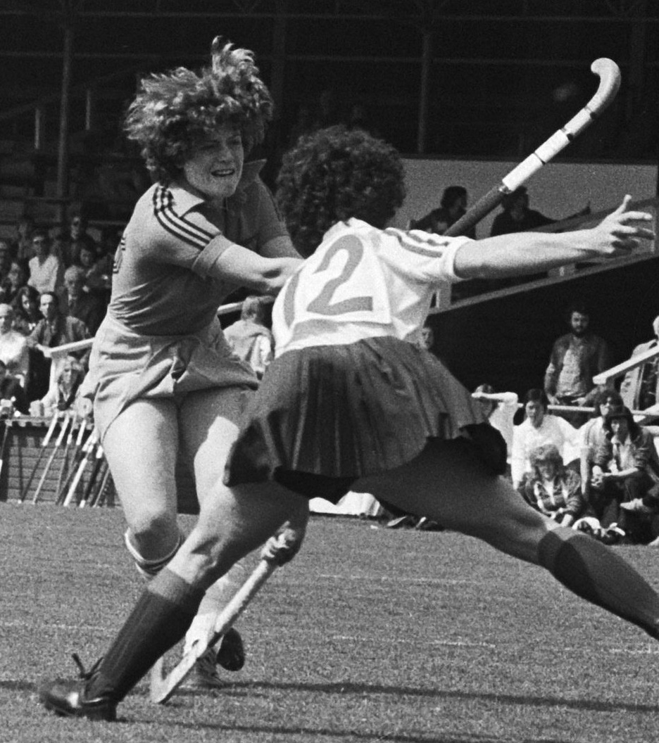 Dameshockey Nederland tegen Engeland; Frekie Boekhorst brengt de stand op 1-0